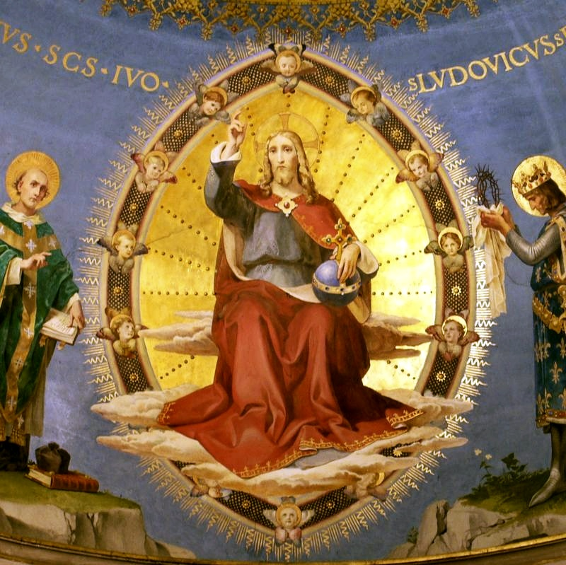 Fresque de Ludwig Seitz (1844-1908) dans l'église Saint-Yves-des-Bretons, Rome